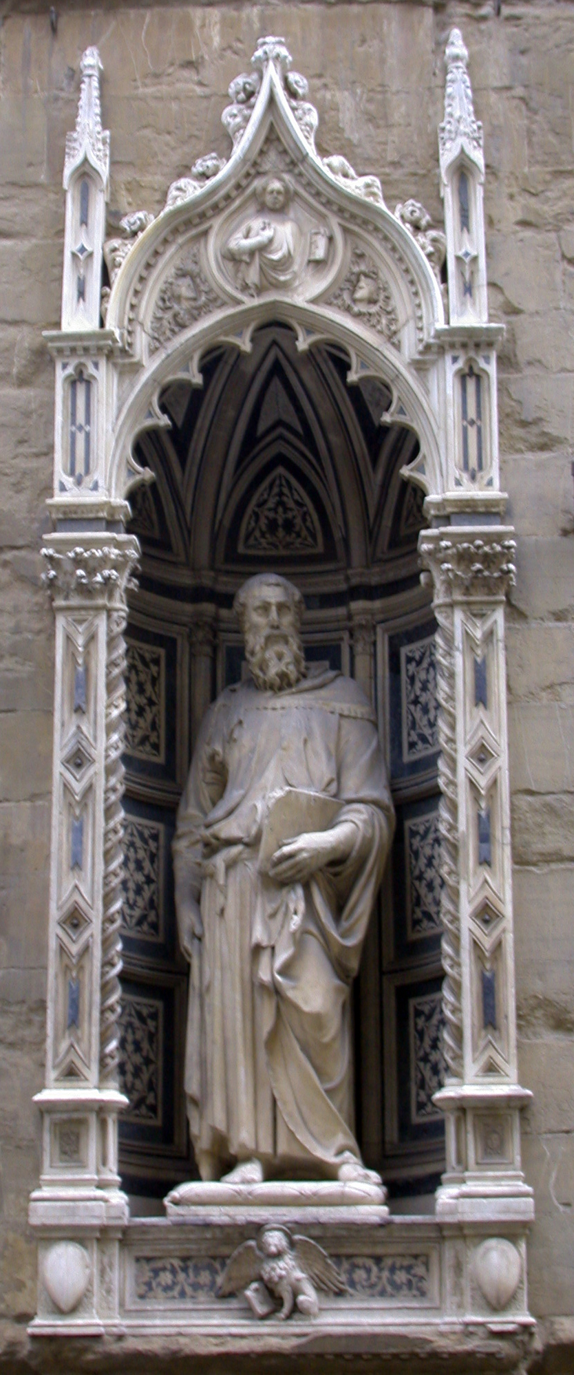 Statue de saint Marc évangéliste par Donatello, Orsanmichele, Florence